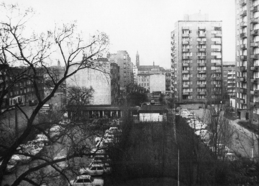 Osiedle Hetmańskie w Poznaniu z wieżowca MPK. 1991r.